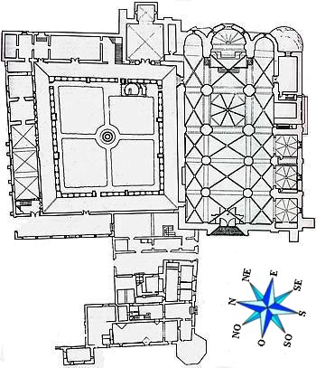 Plànol Monestir de Sant Cugat